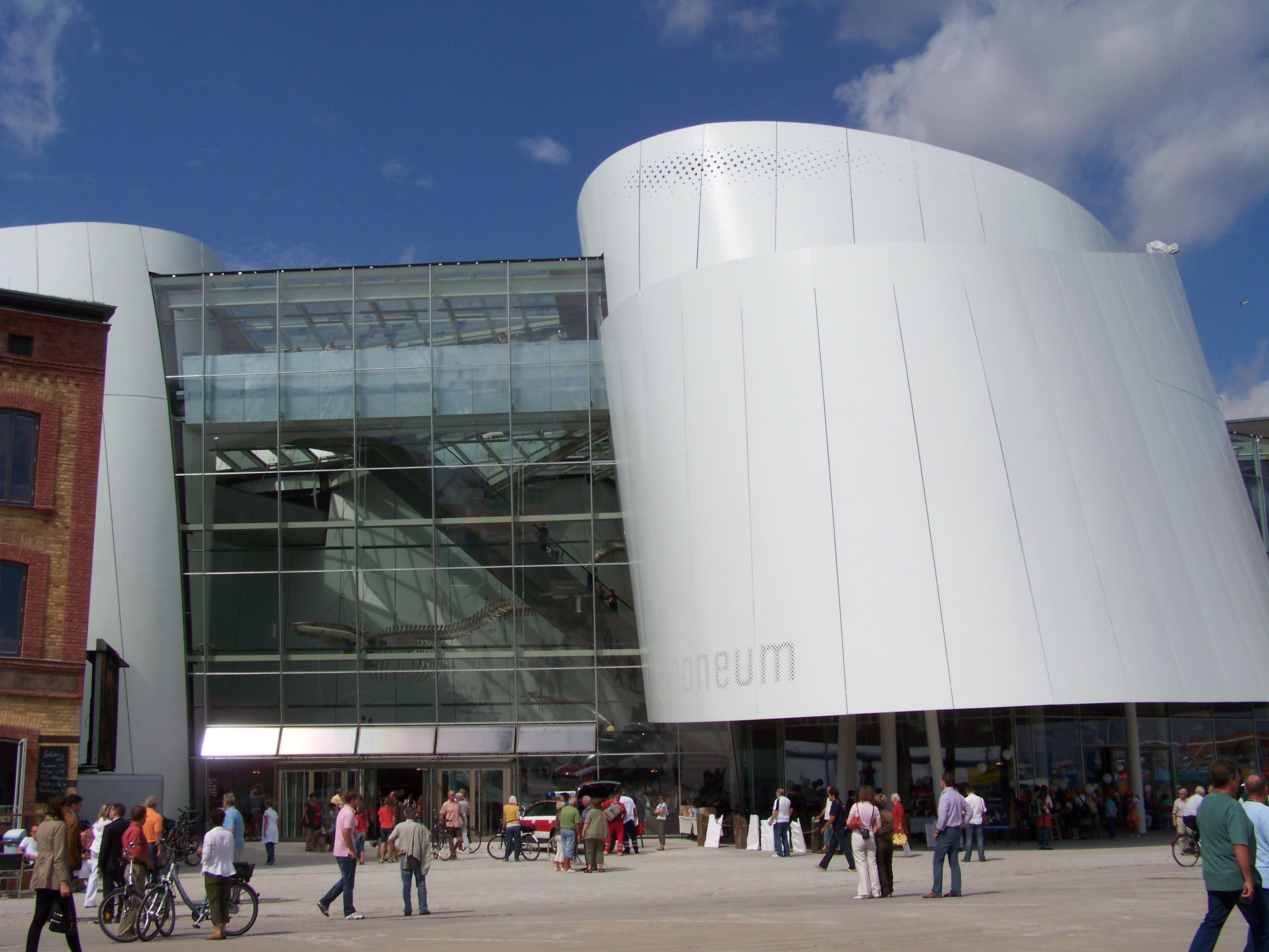 Das Ozeaneum in Stralsund, Eingangsbereich